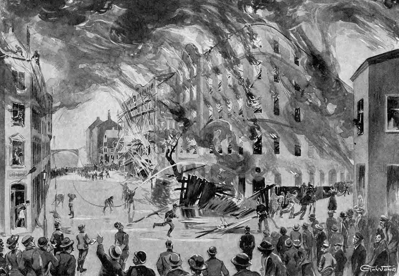 Kamratföreningen Röde Hanen, den stora branden på söder 1906